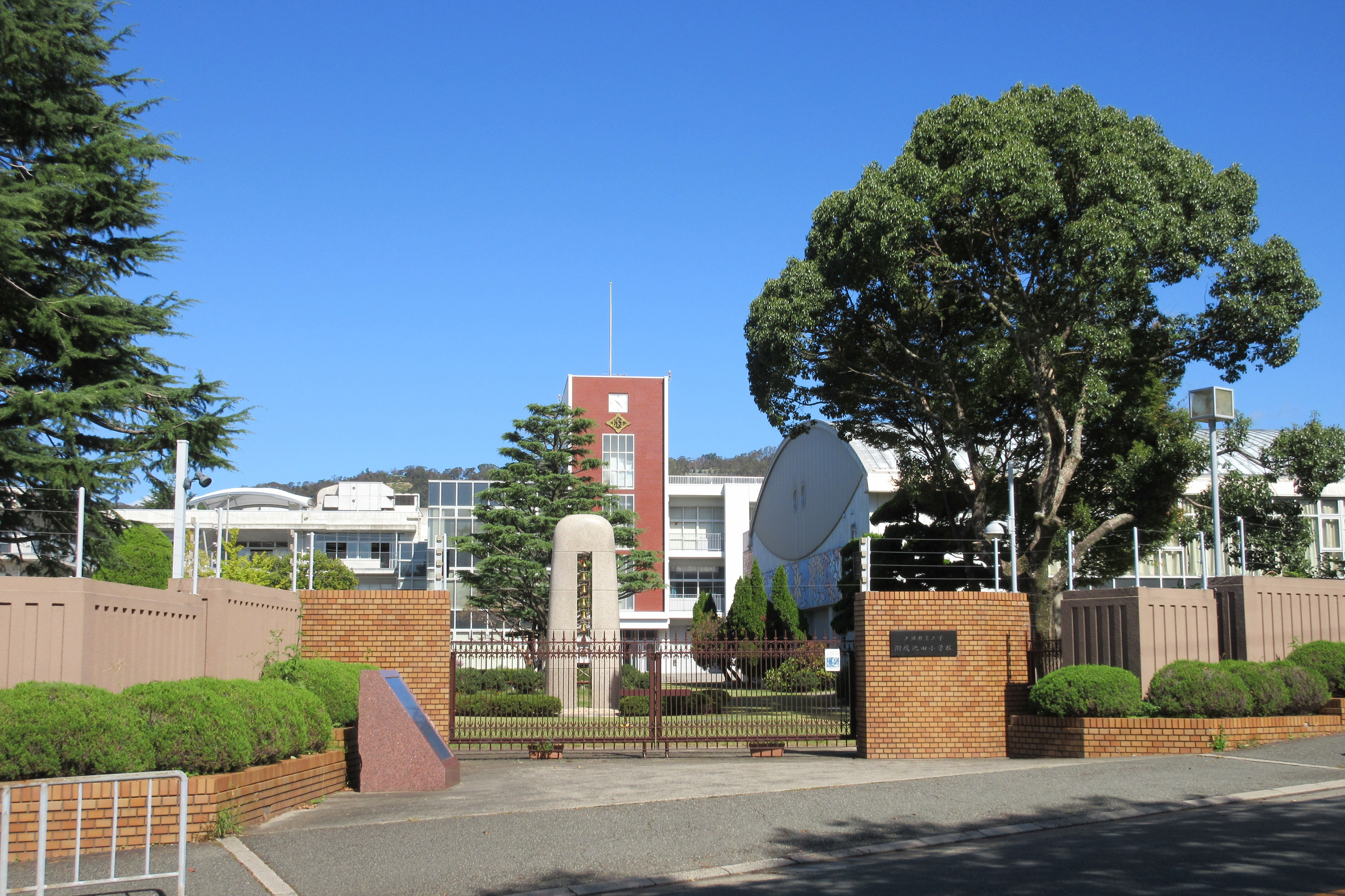 大阪教育大学附属池田小学校